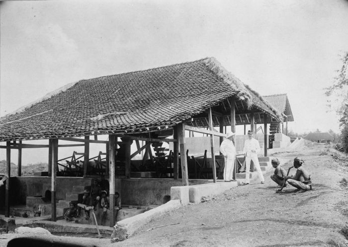 Foto. Een indigofabriek